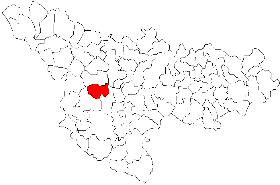 Sânmihaiu Român, Timiş Licensing Categorie:Hărţi ale judeţului Timiş